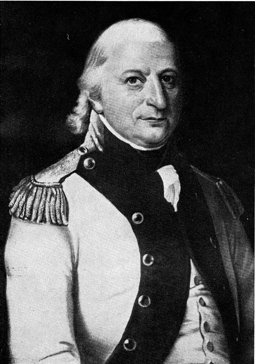 Johann Friedrich Nering Bögel, Direktor der Isselburger Hütte